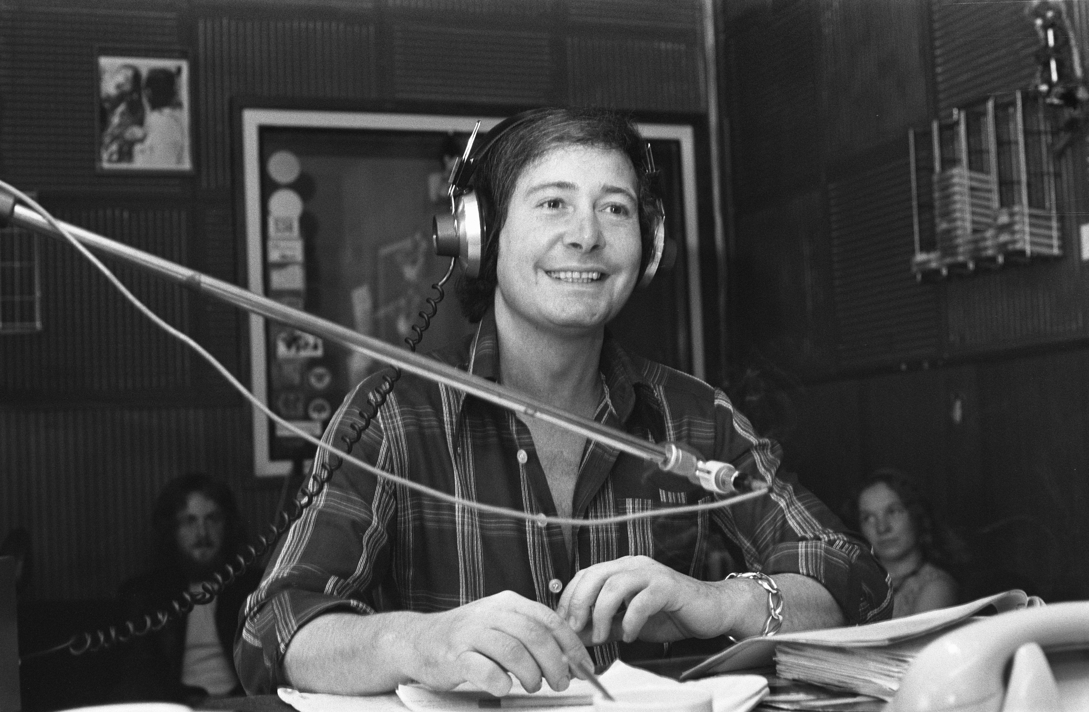 Collectie / Archief : Fotocollectie Anefo Reportage / Serie : [ onbekend ] Beschrijving : Aanstaande zaterdag 31 augustus gaat piratenzender Radio Veronica uit de lucht; Rob Out tijdens opname Datum : 26 augustus 1974 Trefwoorden : radiozenders Persoonsnaam : Out, Rob Instellingsnaam : Radio Veronica Fotograaf : Mieremet, Rob / Anefo Auteursrechthebbende : Nationaal Archief Materiaalsoort : Negatief (zwart/wit) Nummer archiefinventaris : bekijk toegang 2.24.01.05 Bestanddeelnummer : 927-4113